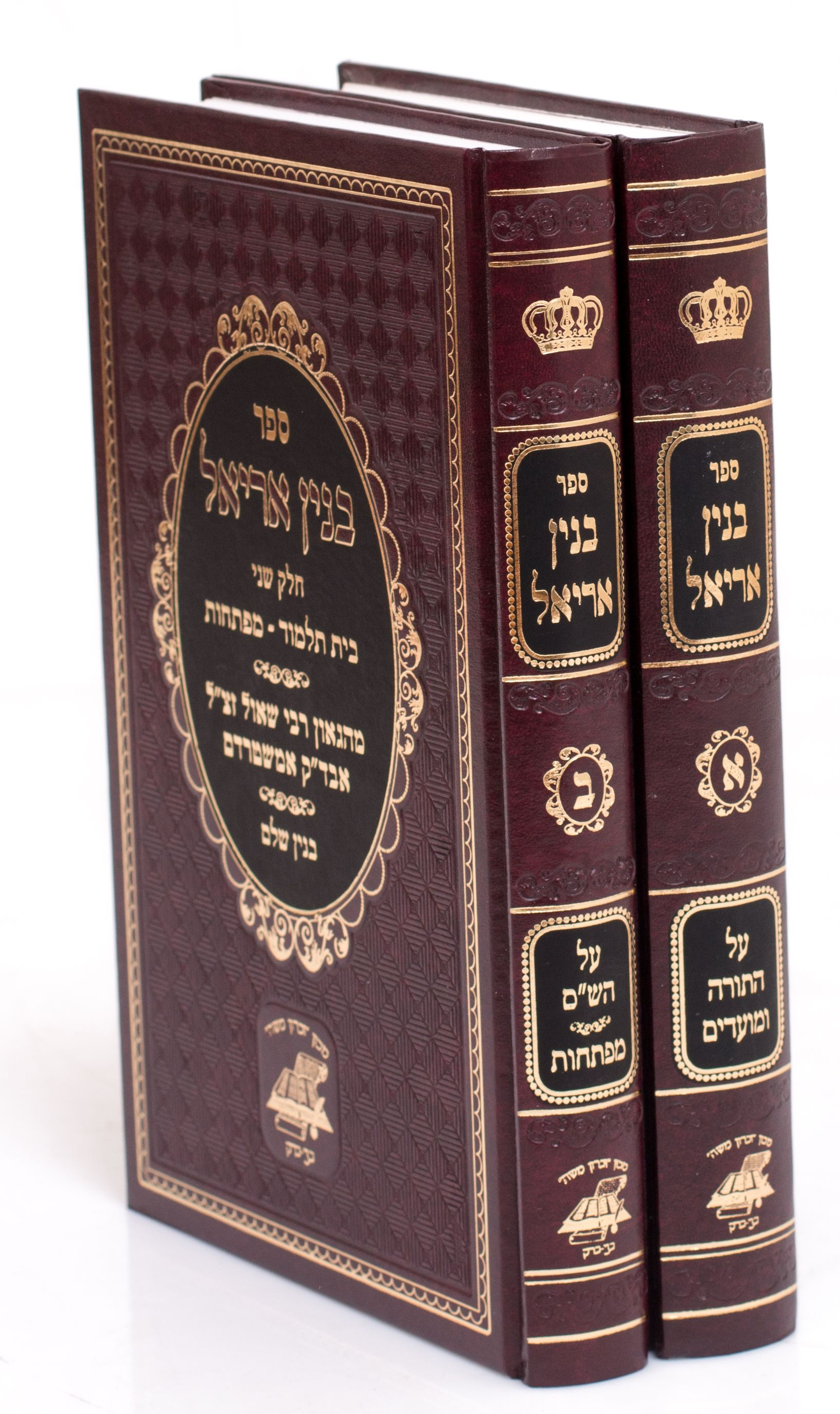 ספר בנין אריאל חיבורו של רבי שאול לעווענשטאם רבה של העיר אמשטרדם